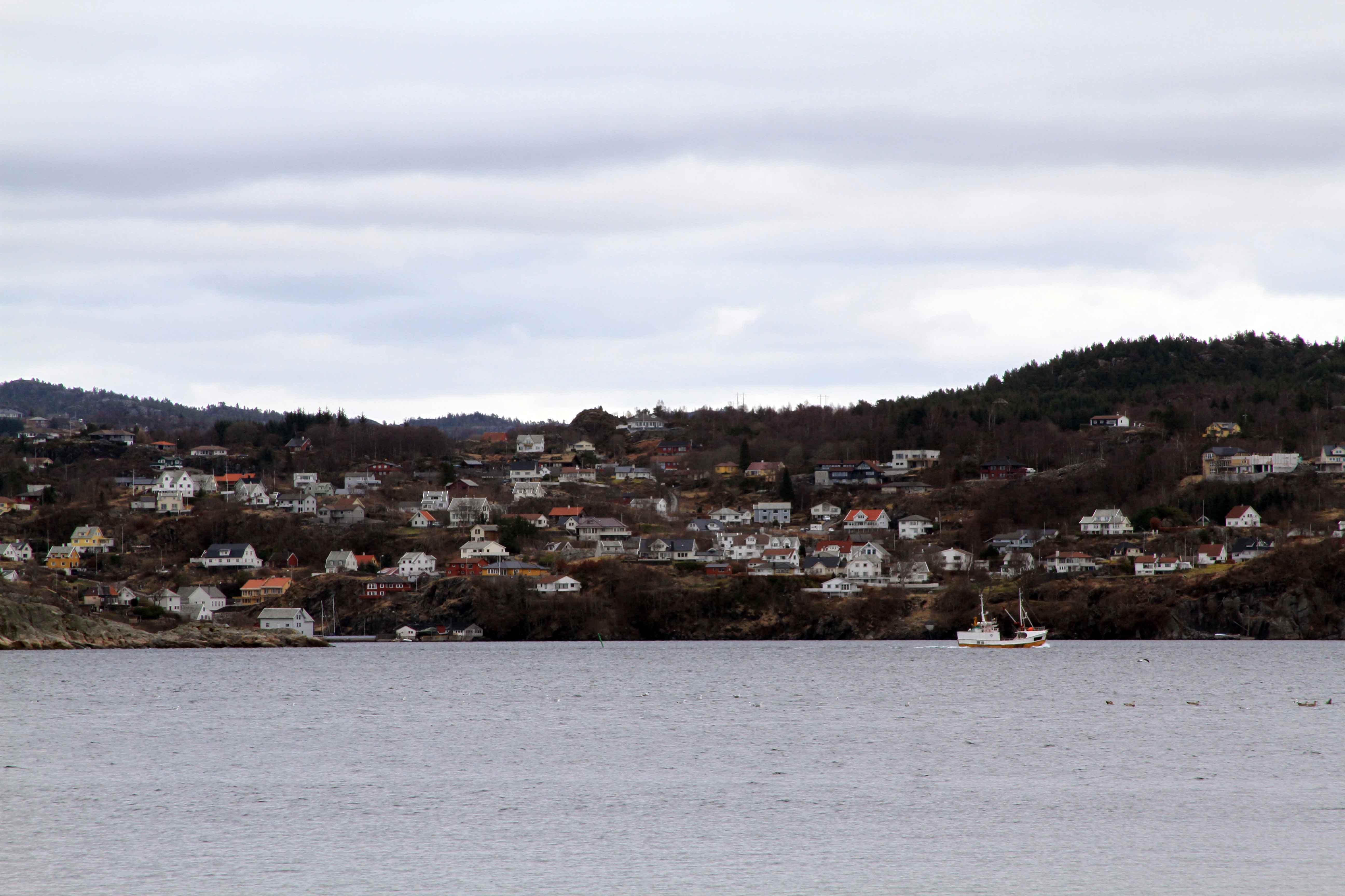 Follese